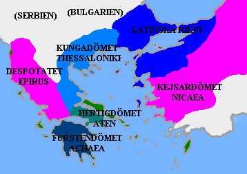 Bild över södra Balkan och Mindre Asien 1204